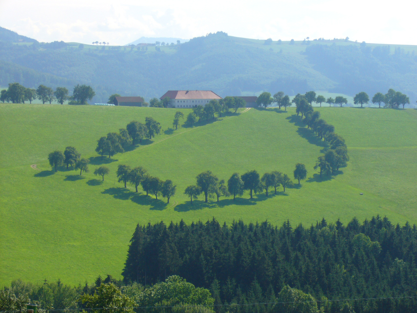 Landschaft im Mostviertel